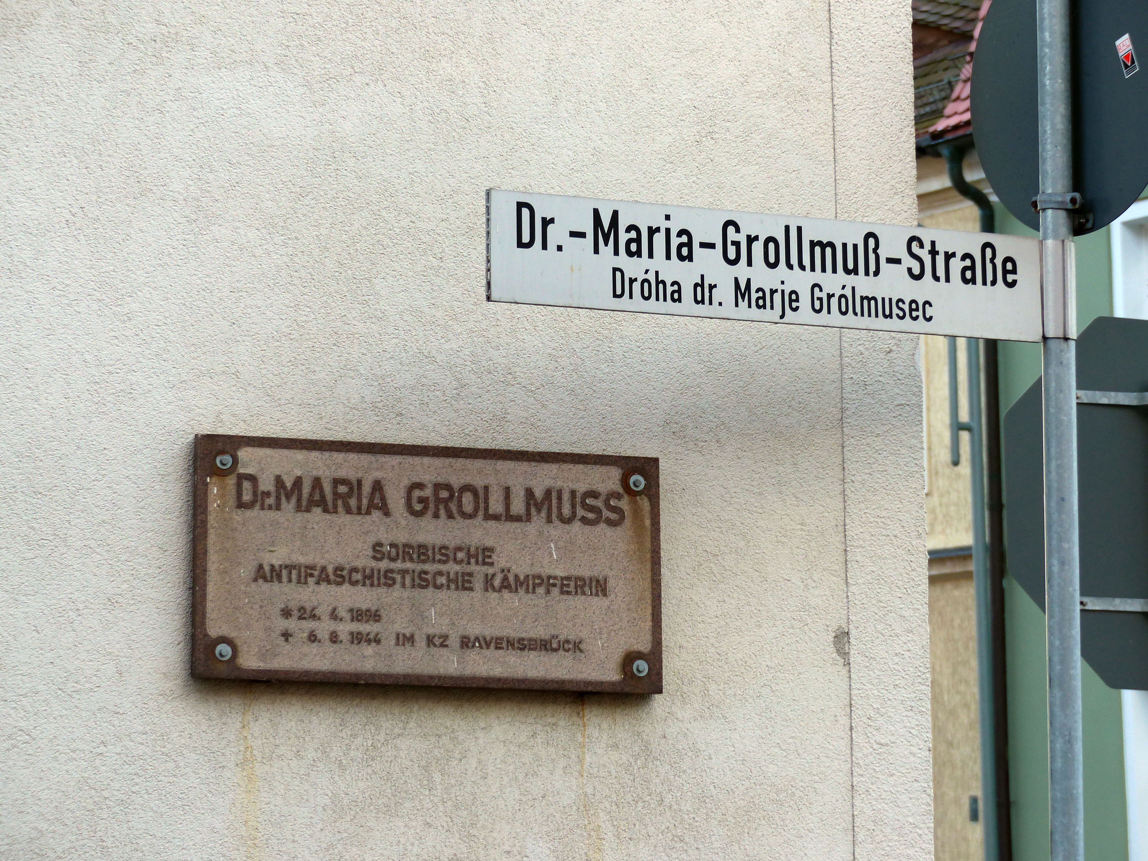 Gedenktafel, Dr.-Maria-Grollmuß-Straße 2, Bautzen